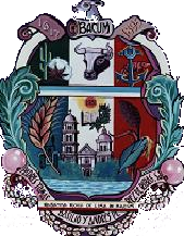 Escudo del municipio sonorense.